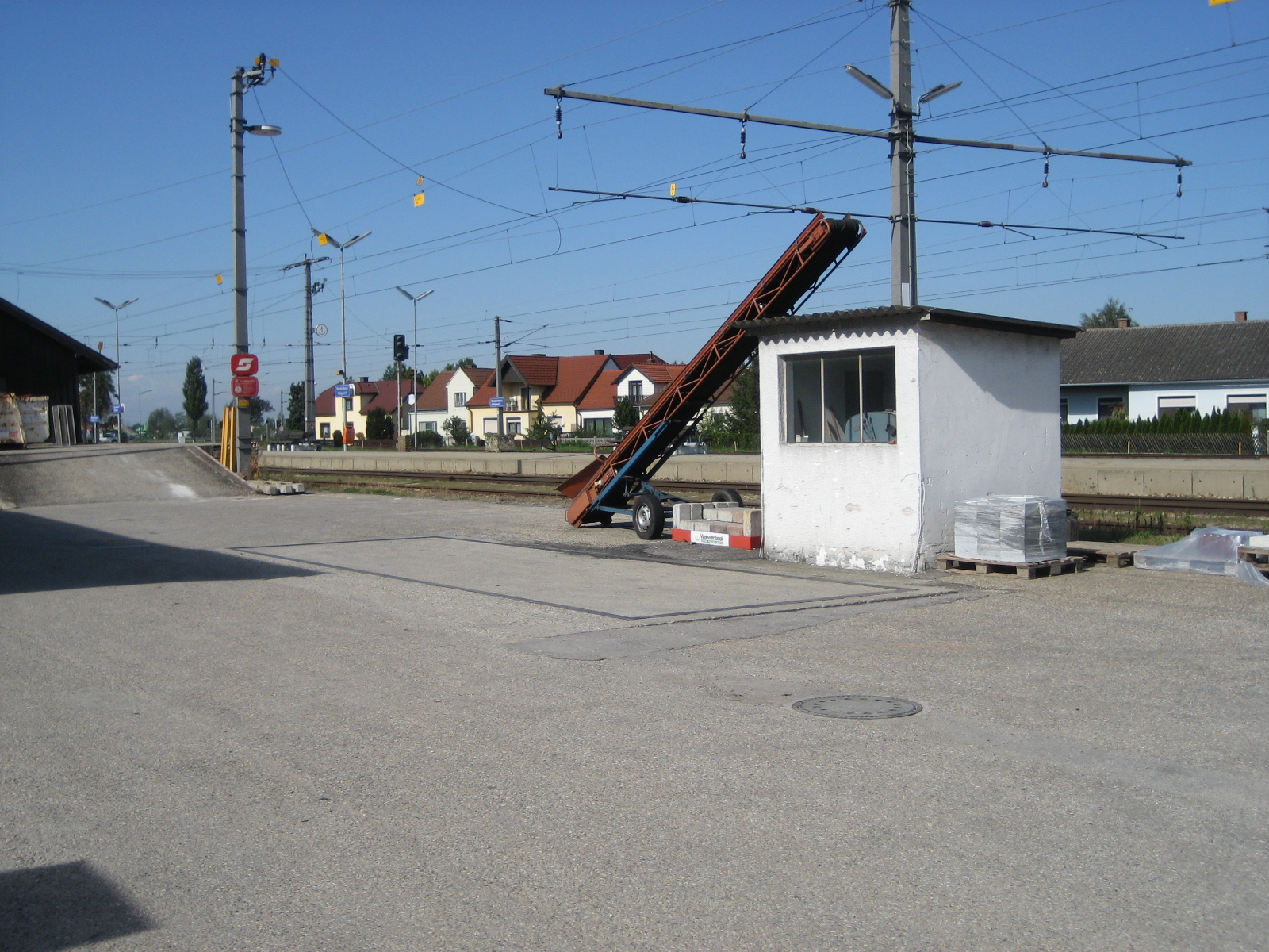 eine Strassenbrueckenwaage